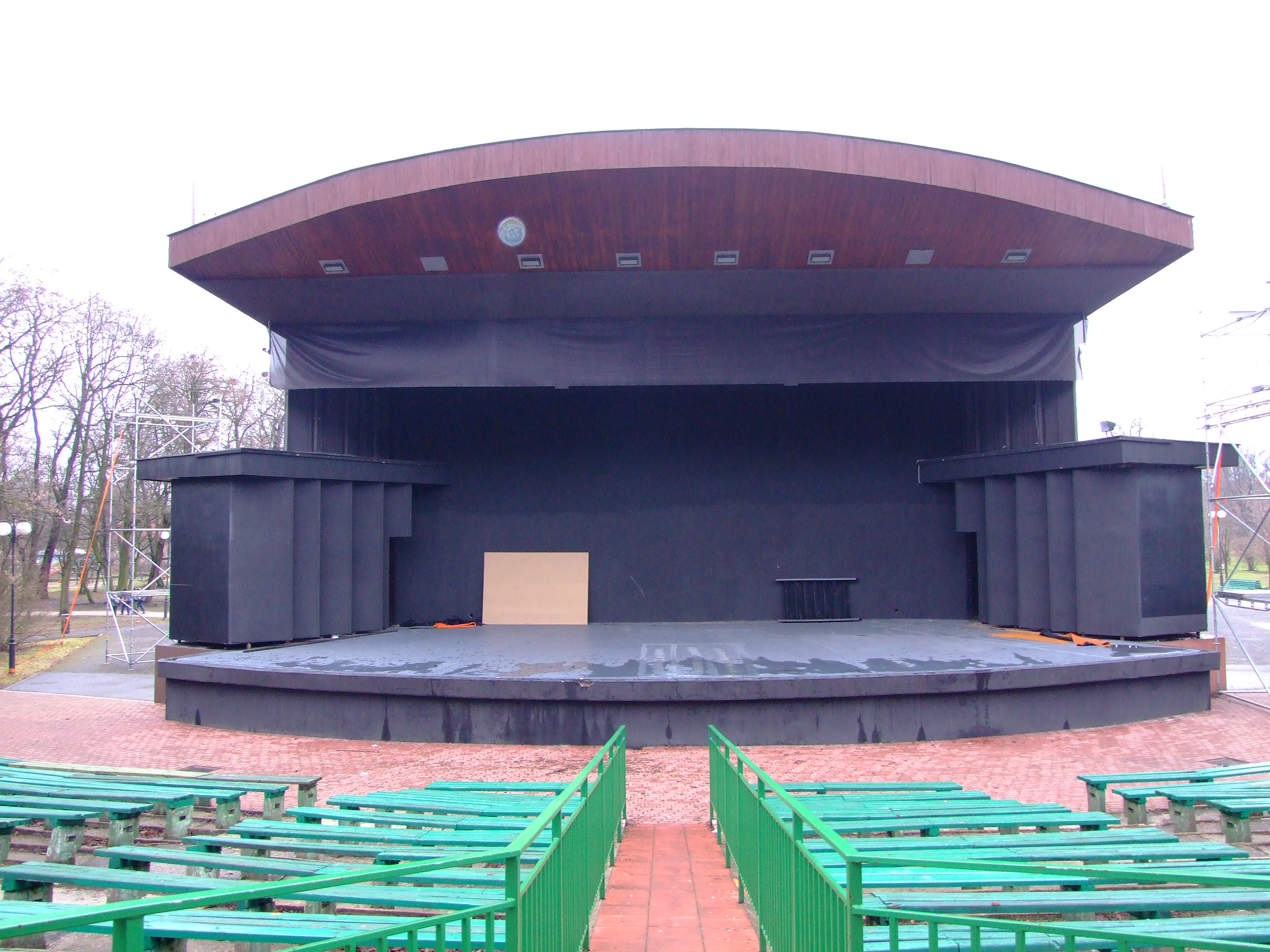 zdjęcie sceny amfiteatru im. Anny Jantar we Wrześni